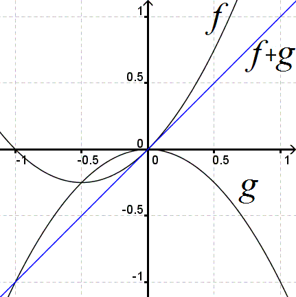 Representación gráfica de suma de funciones.